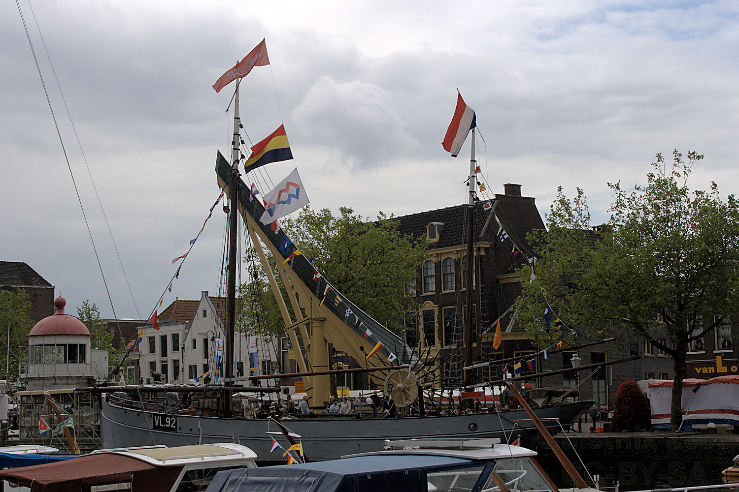 VL 92 Balder, Haringlogger. Vlaardingen - Visserijmuseum, Balder en kraan